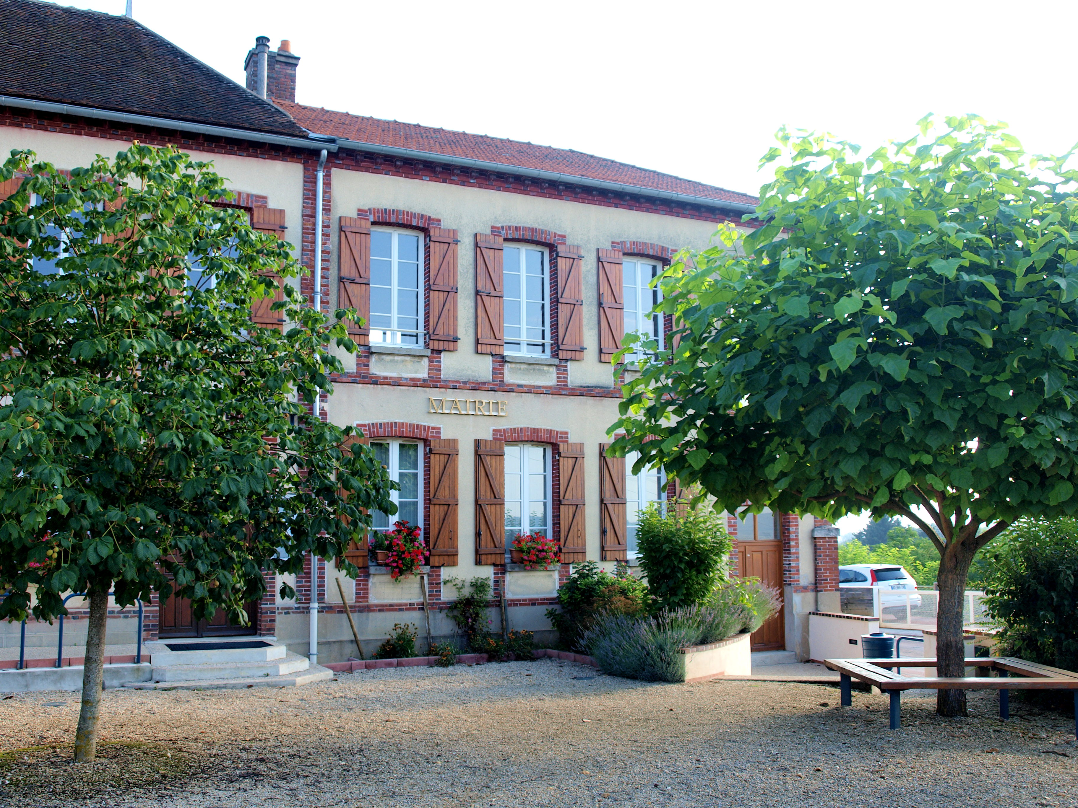 Étigny (Yonne, France) ; mairie-école